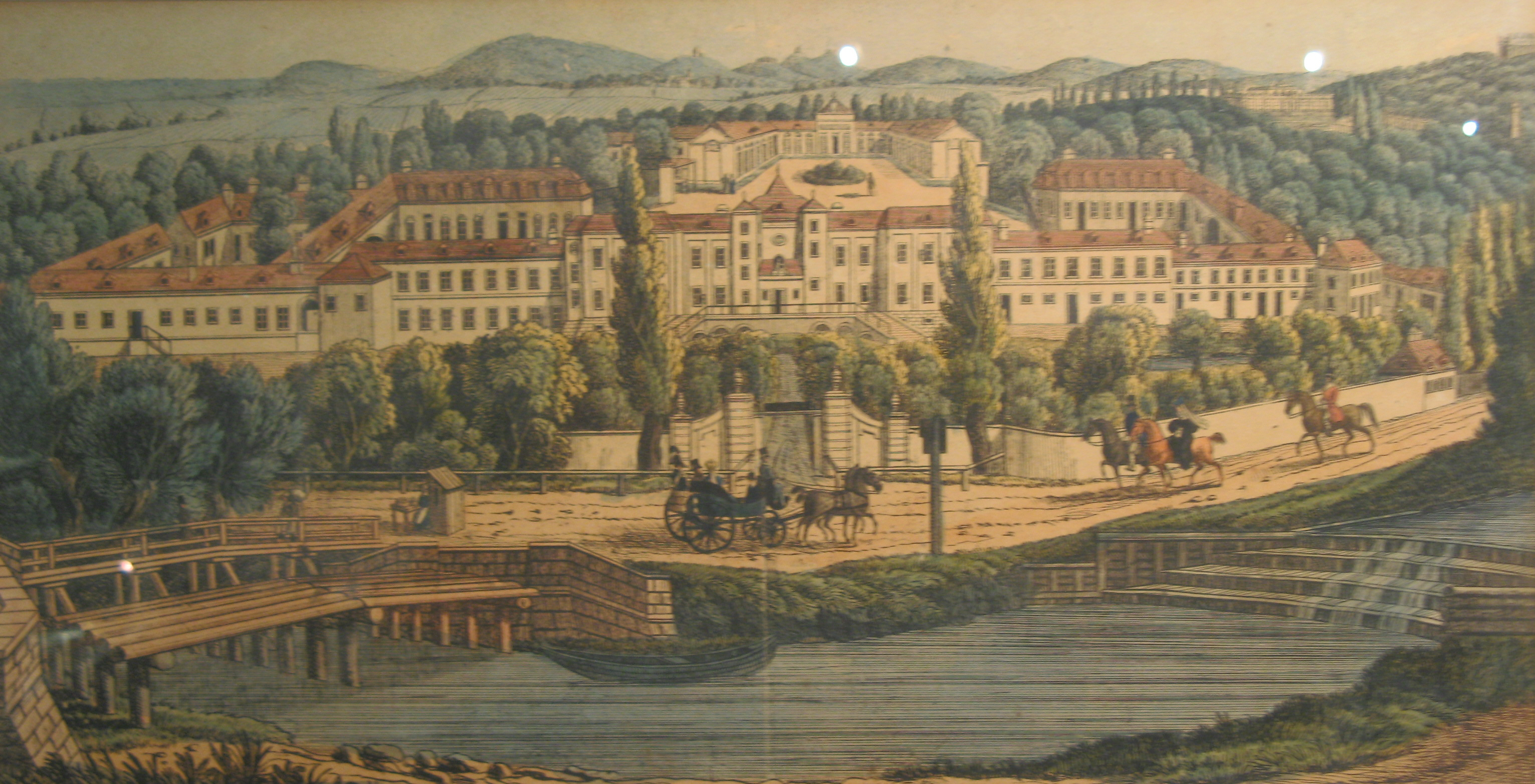 Die Anlage des Theresienbades um 1830 (Meidlinger Bezirksmuseum)